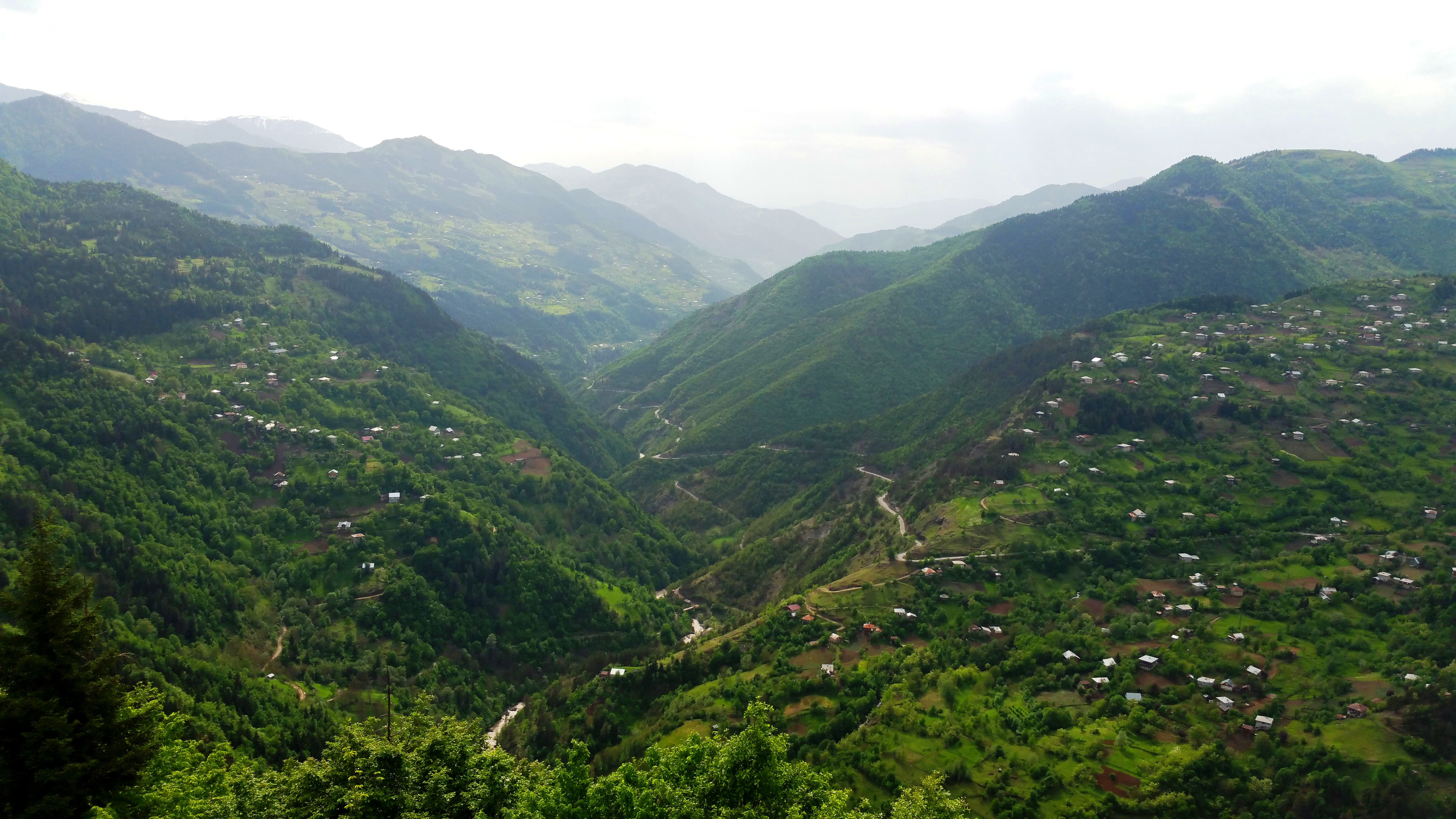 აჭარისწყლის ხეობა ხულოს სიახლოვეს